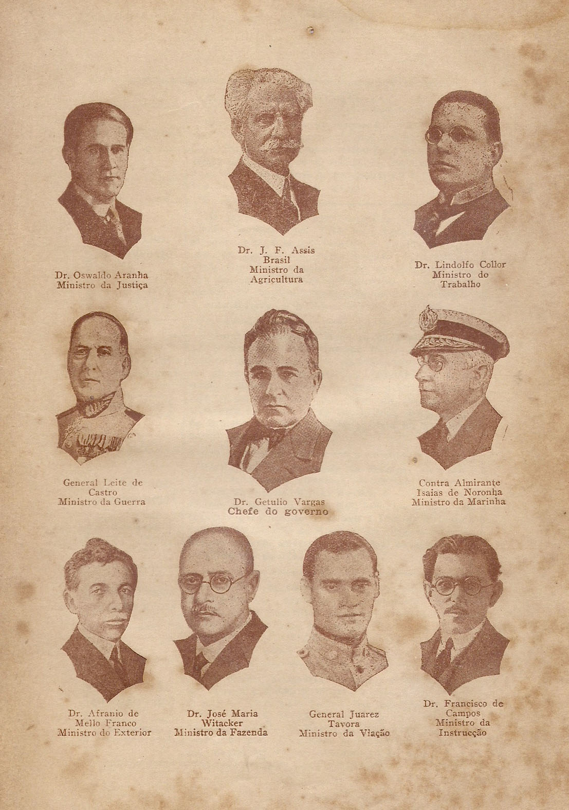 Quadro de Getúlio Vargas com os seus ministros.